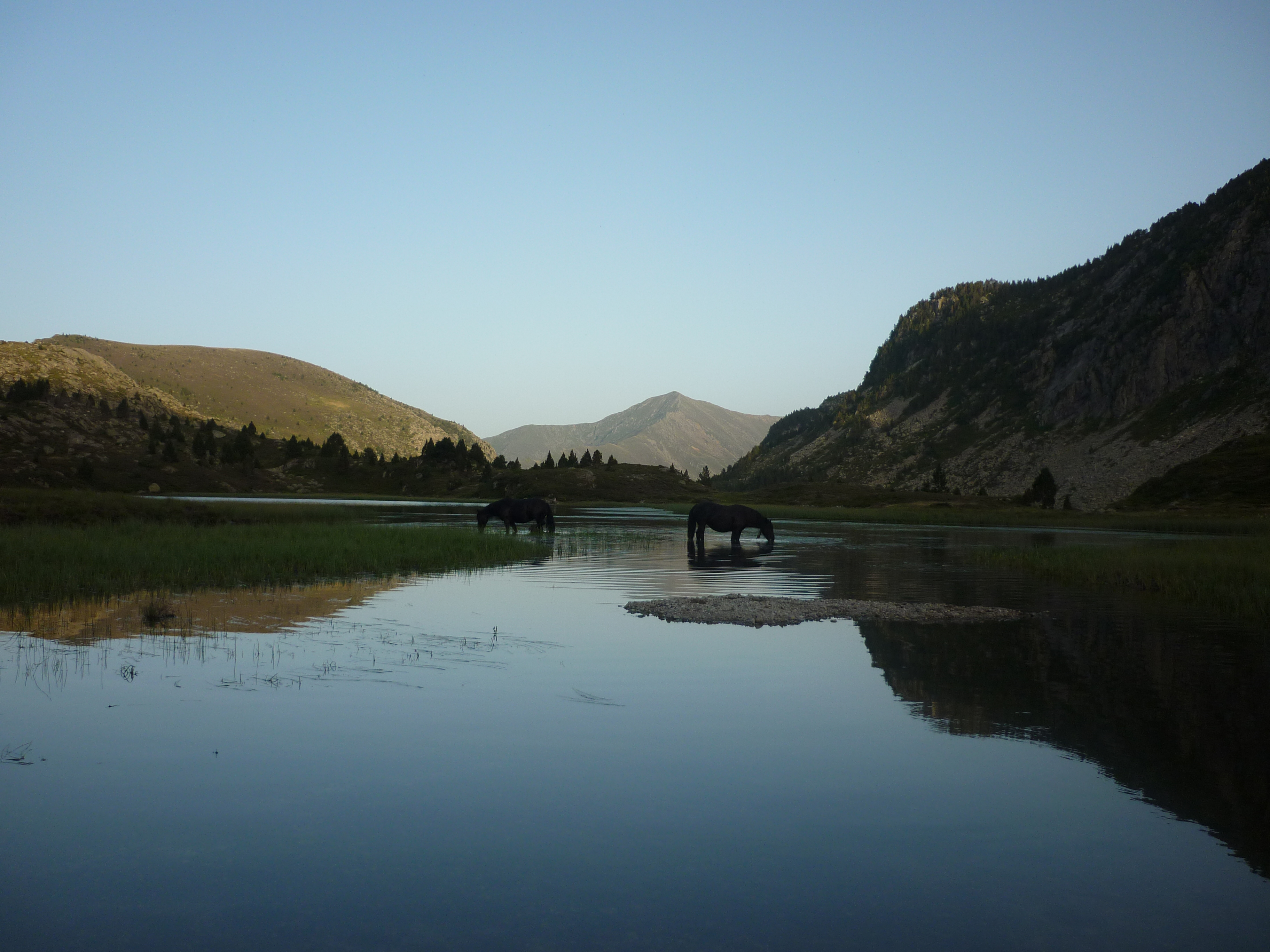 étangs de Bassiès (Auzat) en Ariège Pyrénées et chevaux de Mérens